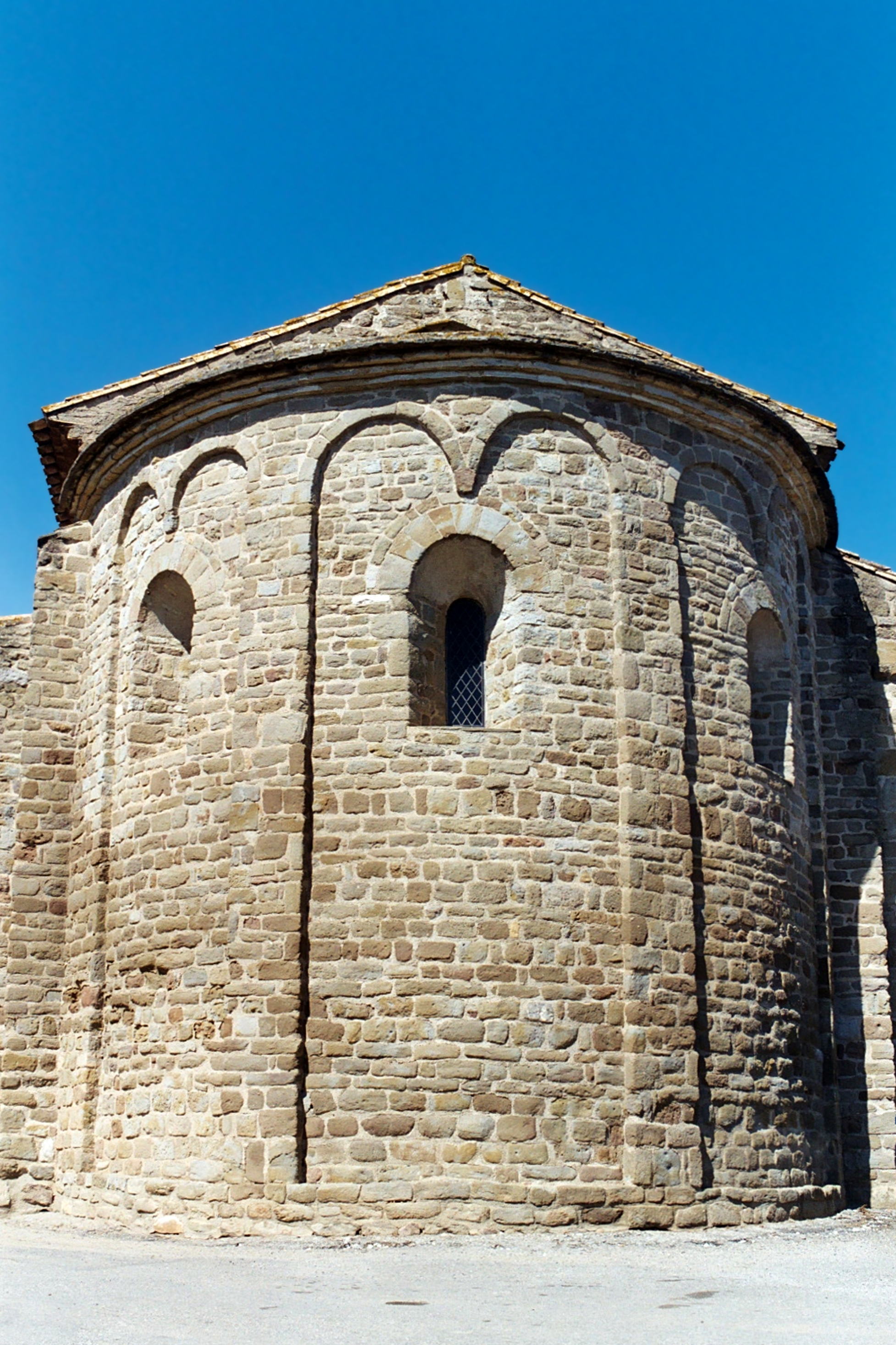 France - Languedoc - Aude - Église Saint-Étienne de Blomac